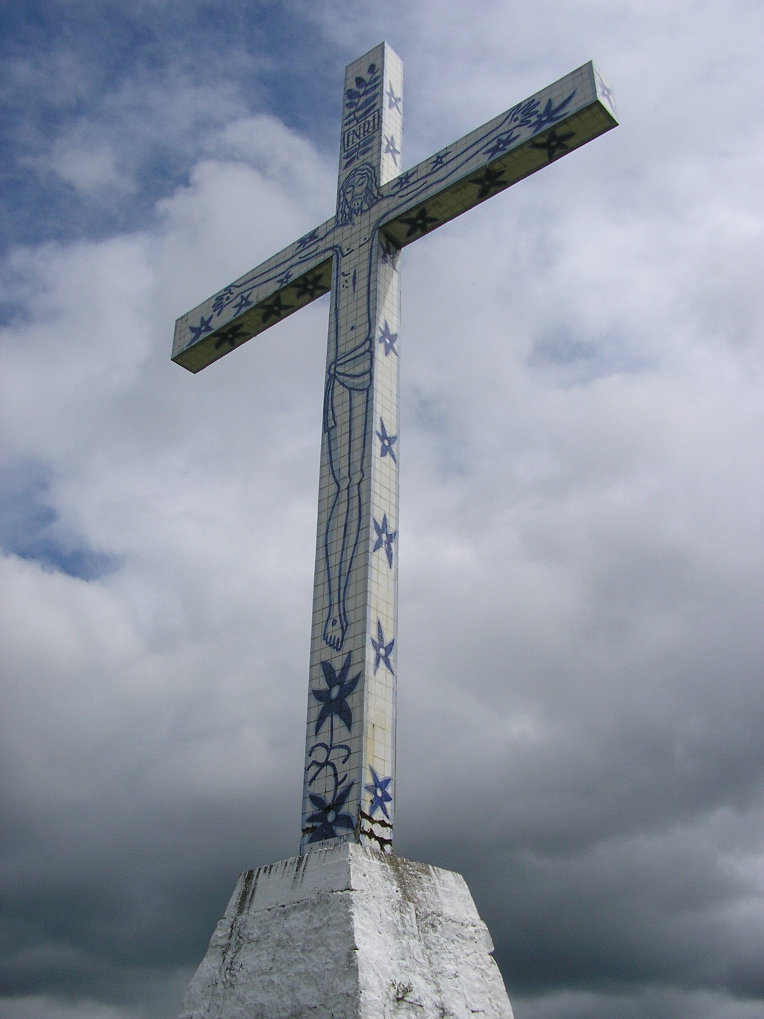 Foto do Cruzeiro na subida para o Memorial Frei Damião - Guarabira/PB